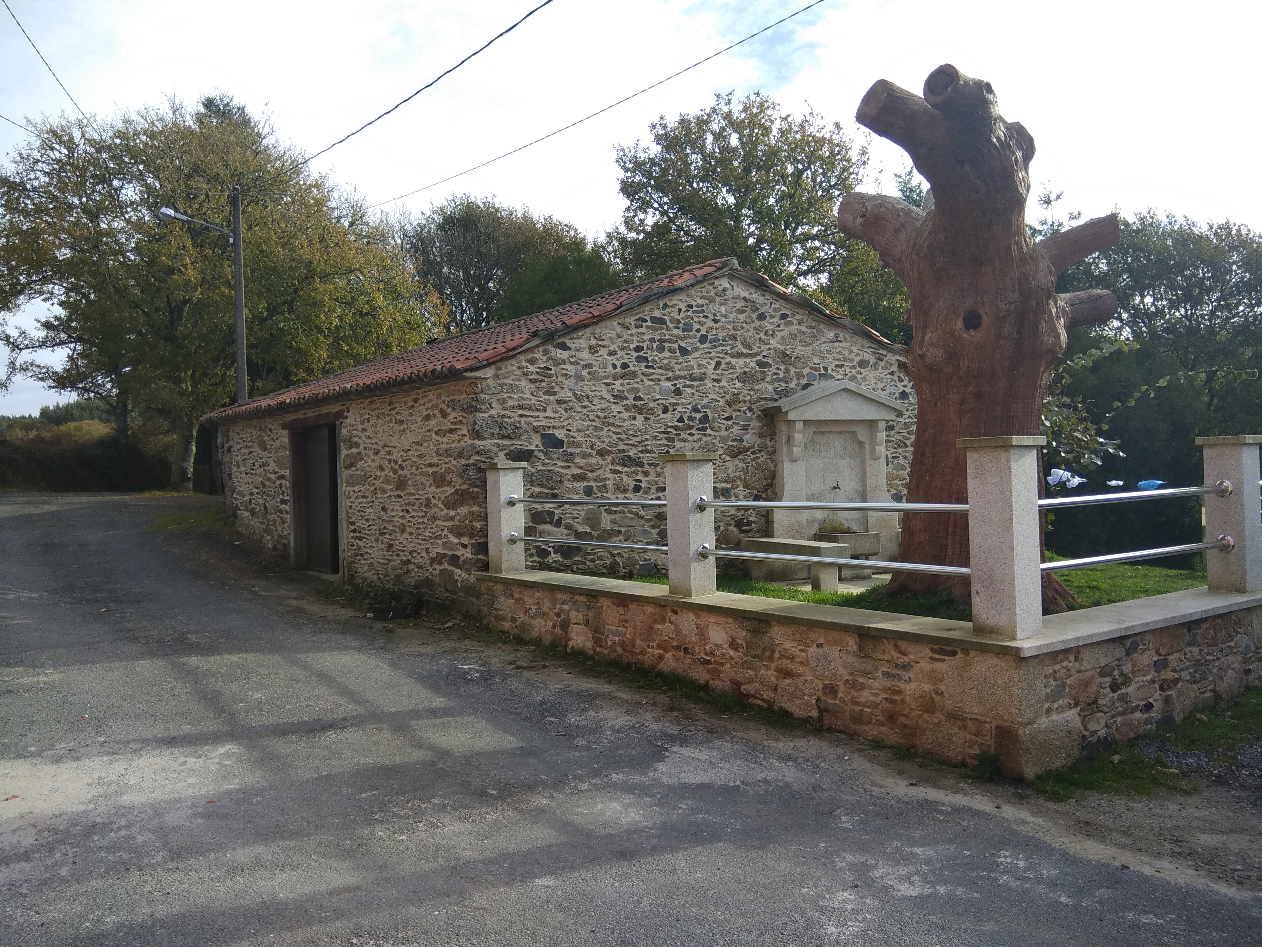 Vista de Sante (Grixalba, Sobrado, Galiza).